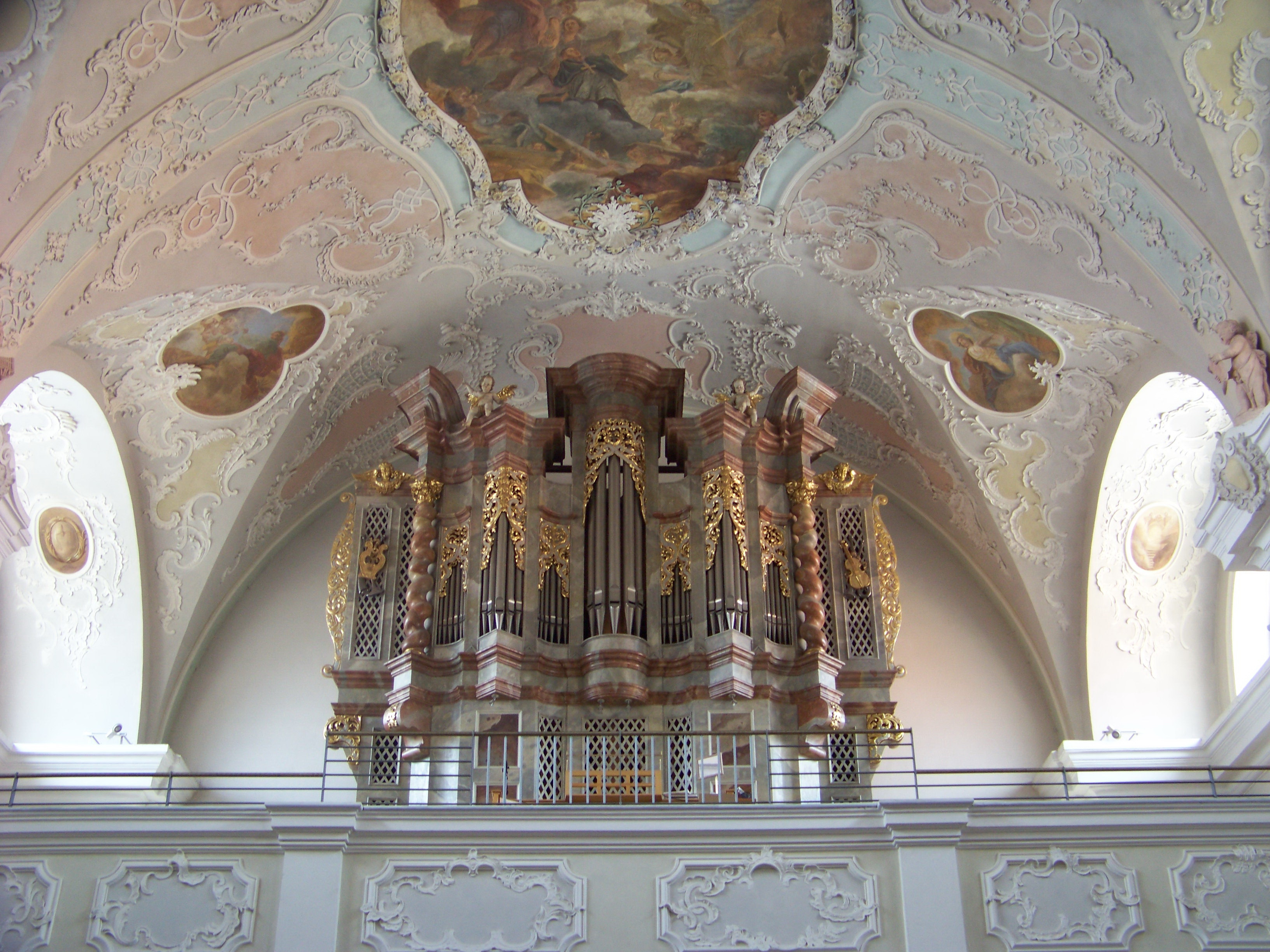 Cham in der Oberpfalz. Kirchplatz 2; Marktplatz 2 Katholische Pfarrkirche St. Jakob. Orgel auf der Westempore. Bei den umfangreichen Kirchenrenovierungsarbeiten im Jahr 2005 wurde die Orgel neu aufgebaut und um einige Register erweitert. Sie hat jetzt 43 Register und 3213 Pfeifen. Im Dezember 2005 fand die Weihe der jetzigen Orgel statt.